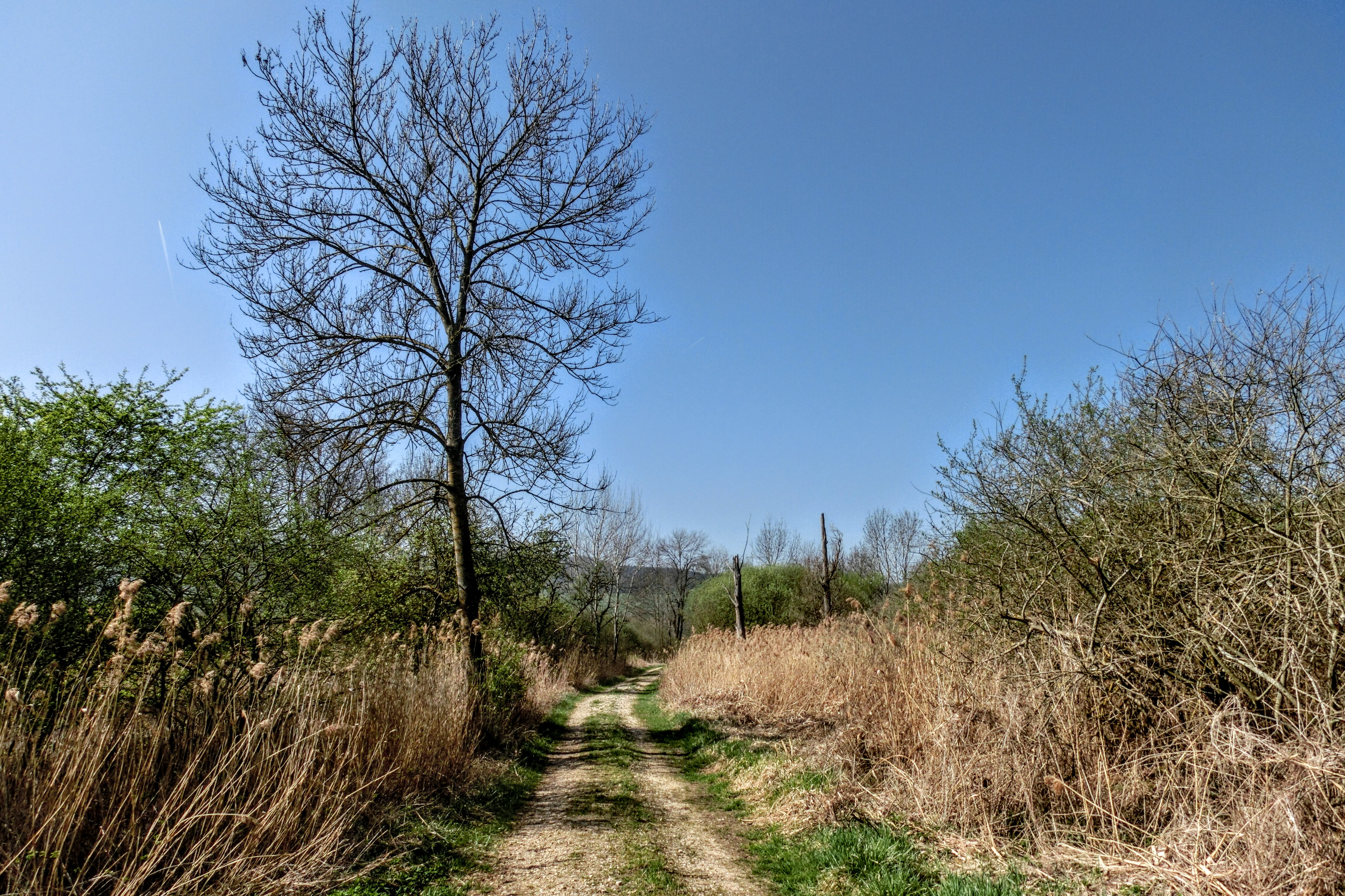 Deutschland (D) - Baden-Württemberg (BW) - Landkreis Konstanz (KN) - Mühlhausen-Ehingen: Naturschutzgebiet "Ehinger Ried"